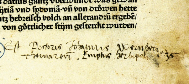 Werner von Themar, Heidelberger Humanist, Besitzervermerk auf alter Buchseite